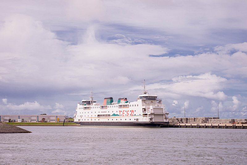 De veerboot Schulpengat in de NIOZ-haven, wachten op haar lot.